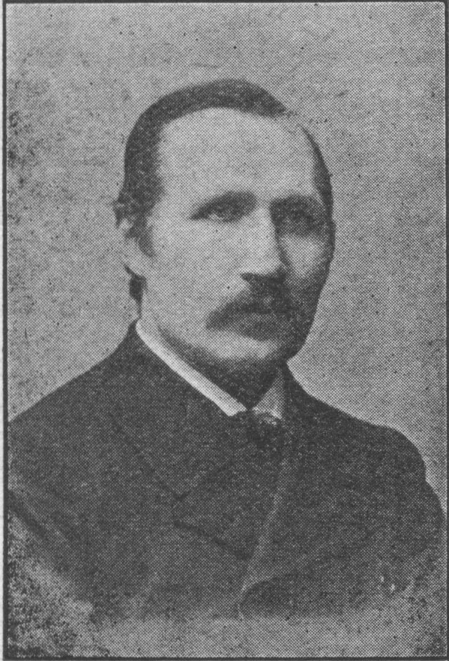 Antti Mäkinen